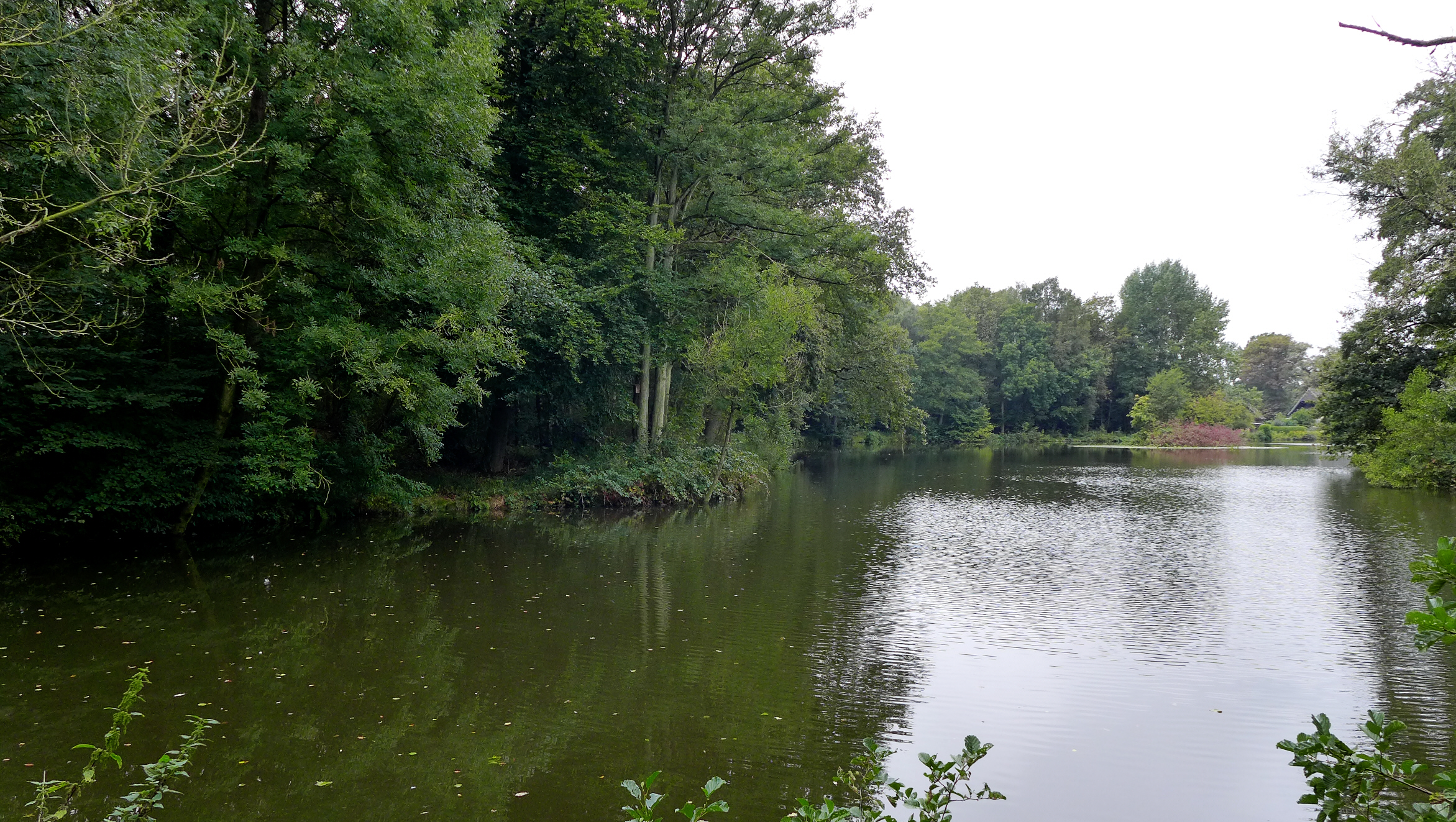 Fintausee in Lauenbrück, Landkreis Rotenburg (Wümme).